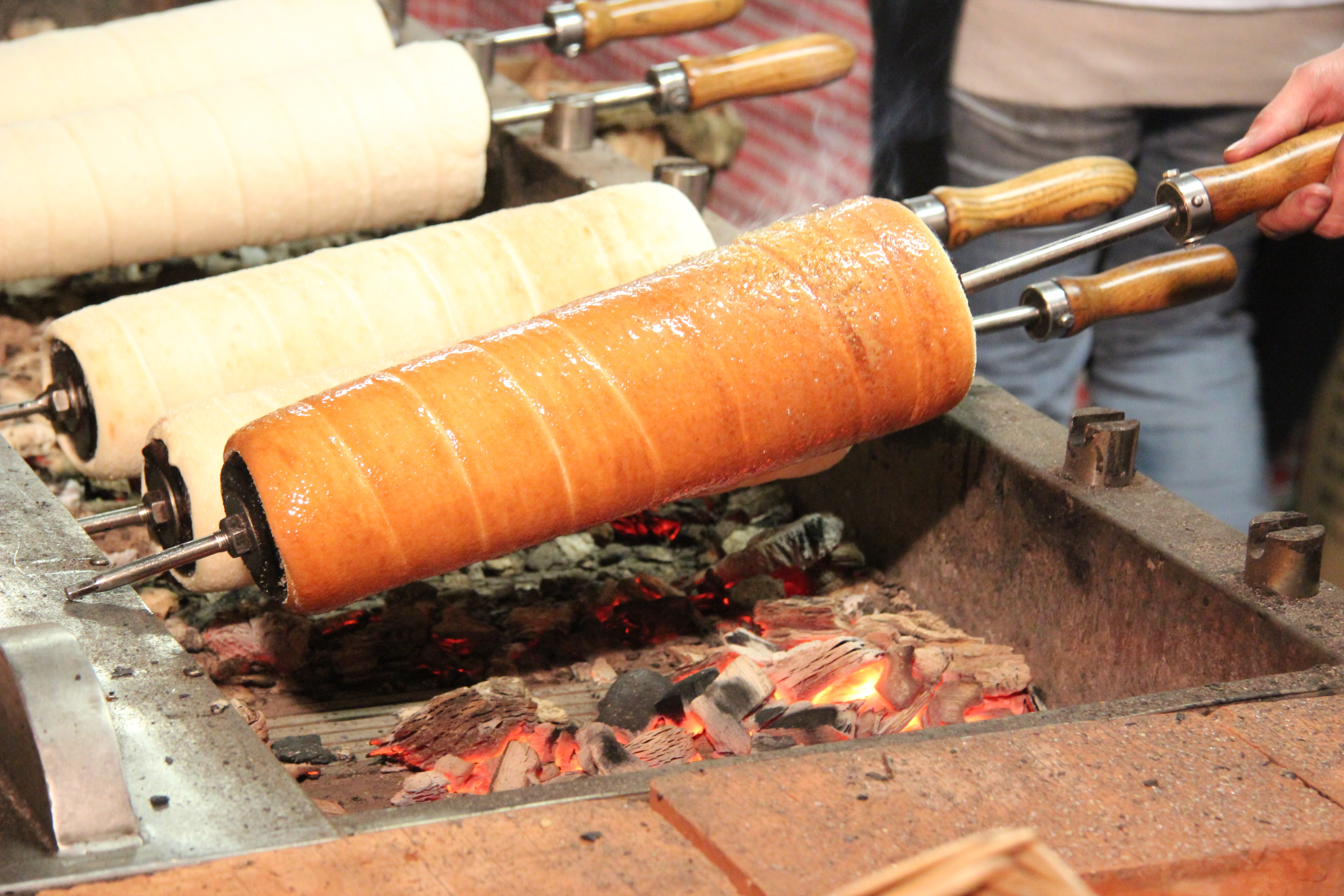 Baumkuchen auf einem Budapester Weihnachtsmarkt